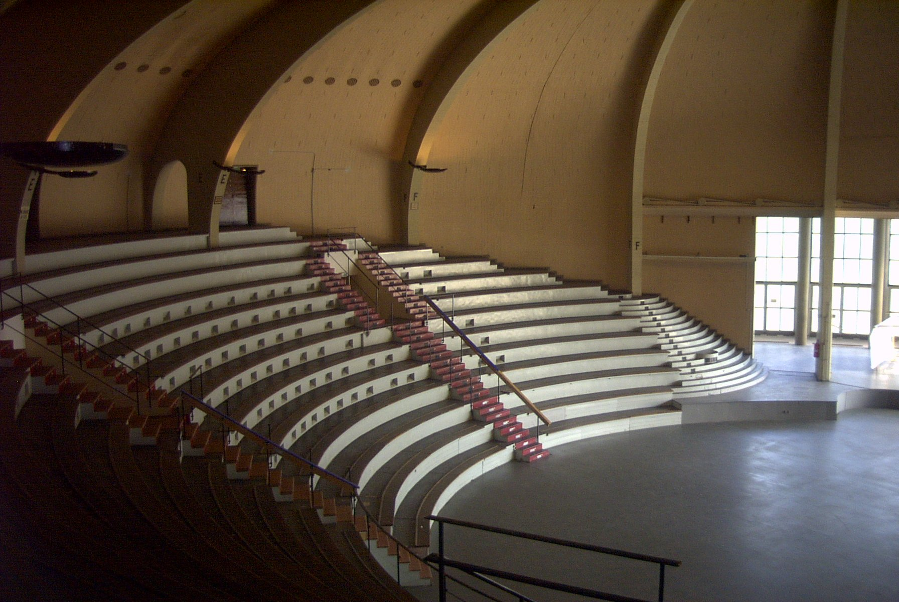 Deutsches Sportforum - Haus des deutschen Sports - Kuppelsaal